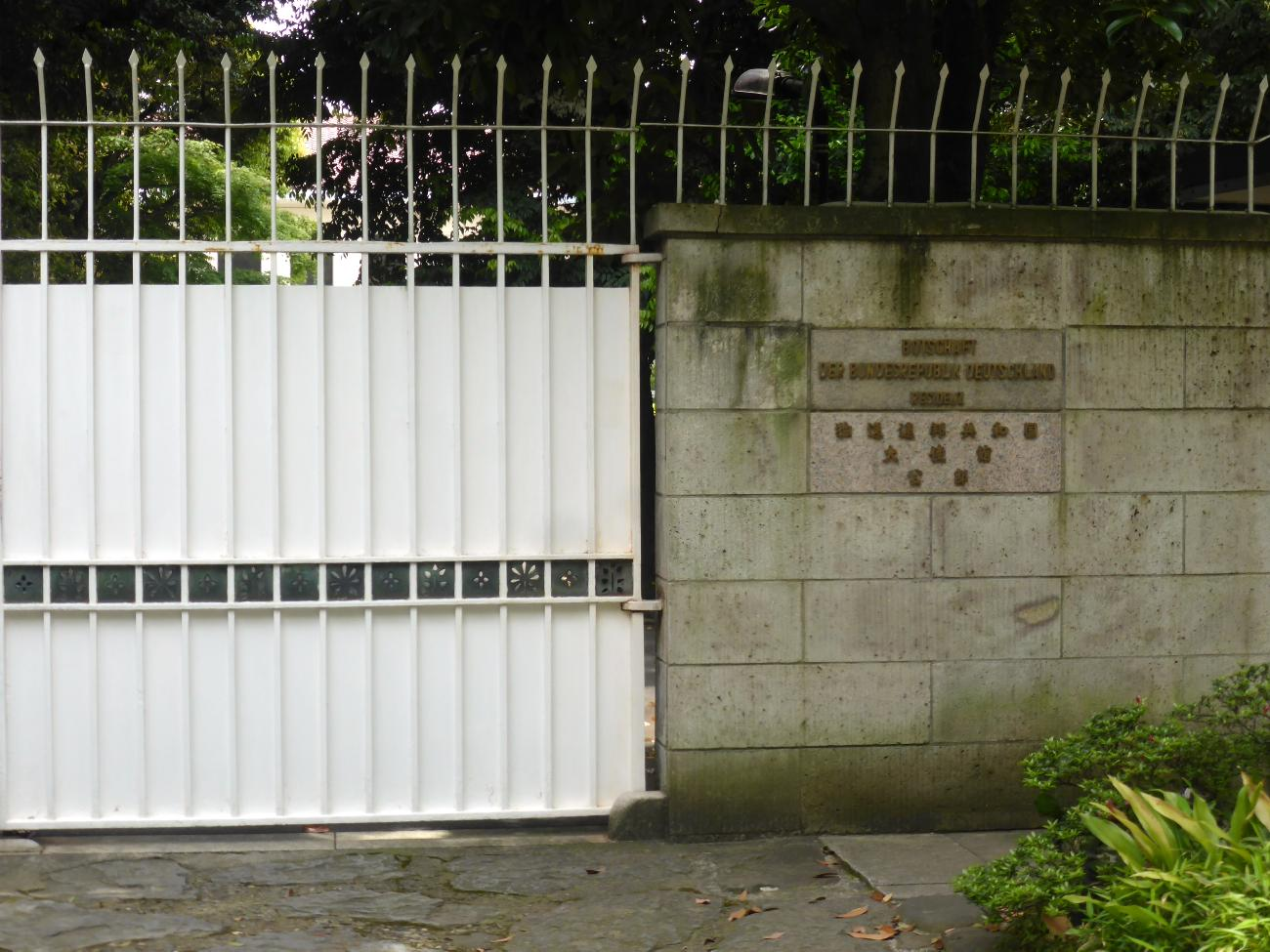 独逸大使館公邸表札